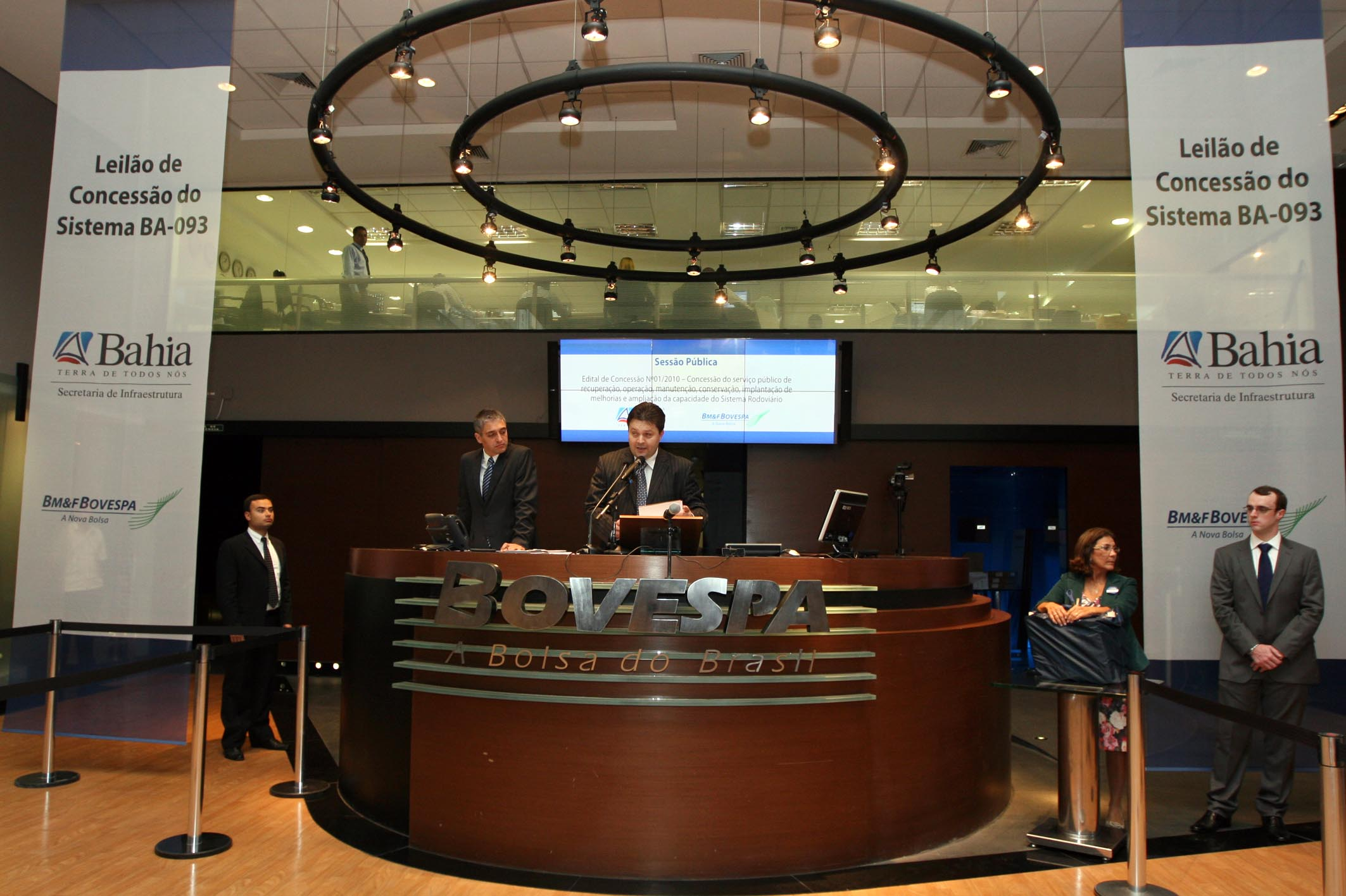 Leilão do Sistema BA-093, realizado na sede da Bolsa de Valores, Mercadorias e Futuros (BM&FBovespa), em São Paulo. A concessionária Invepar-Odebrecht que ganhou o leilão do Sistema BA-093 fica responsável pela administração de todo o Sistema por 25 anos e realizar uma série de intervenções. Ate o ano de 2020, todo o Sistema será totalmente duplicado. Estima-se um investimento da ordem de R$ 805 milhões. Na foto: Leilão do Sistema BA-093 Fotos; Vaner Casaes / AGECOM Data: 03/05/2010